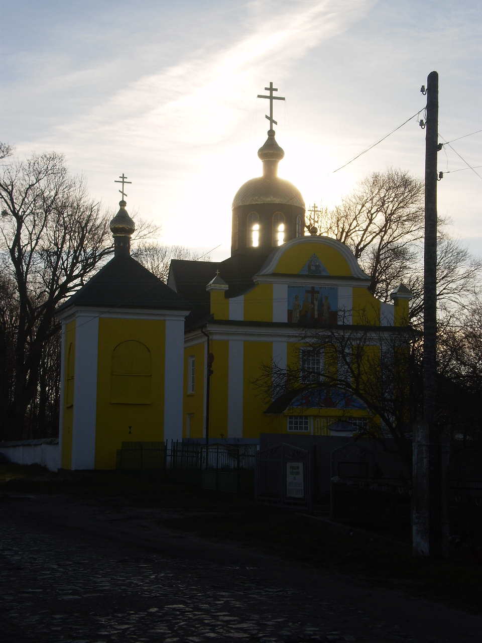 Свято-Хресто-Воздвиженська церква, побудована в 1821 р. за кошти поміщика Мйончинського та парафіян села Обенижі. Пам`ятка архітектури.